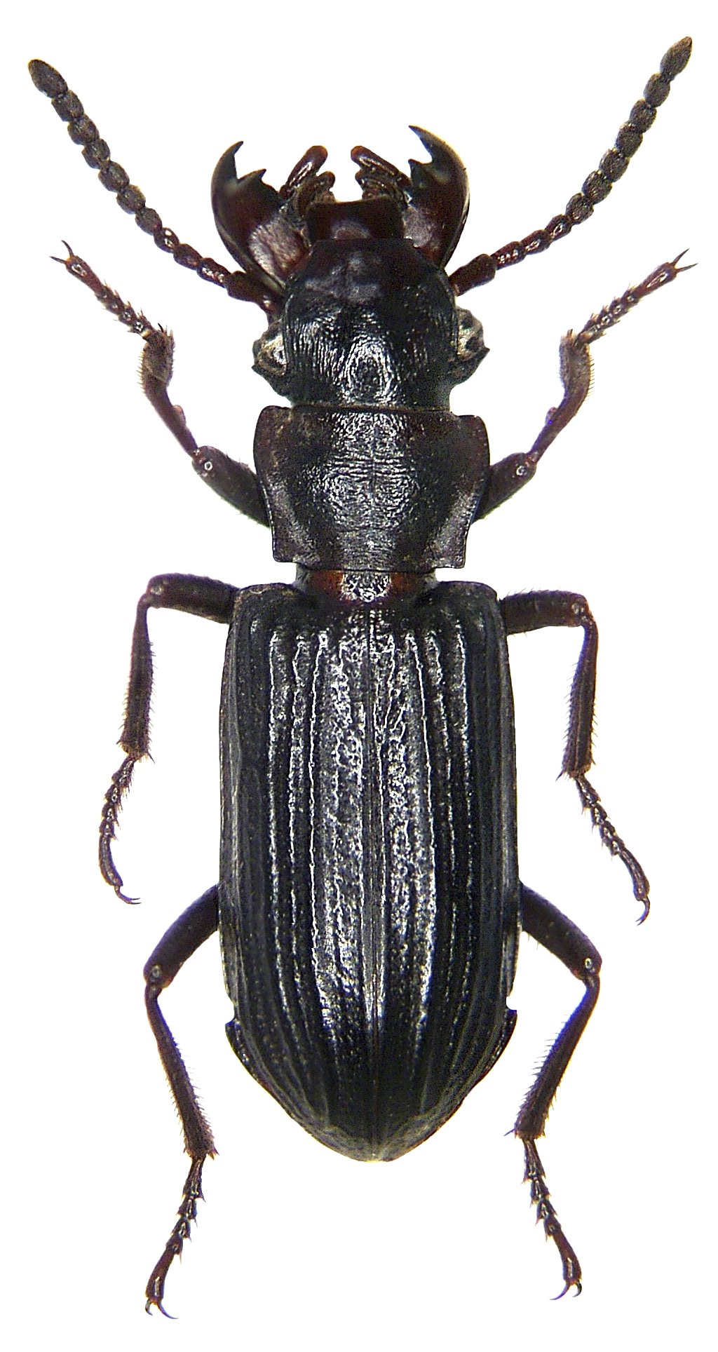 Familie: Carabidae Grösse: 7 mm Fundort: Indonesien, Sulawesi, Toraut leg. A.Skale, 2006; det. M.Baehr Foto: U.Schmidt, 2007